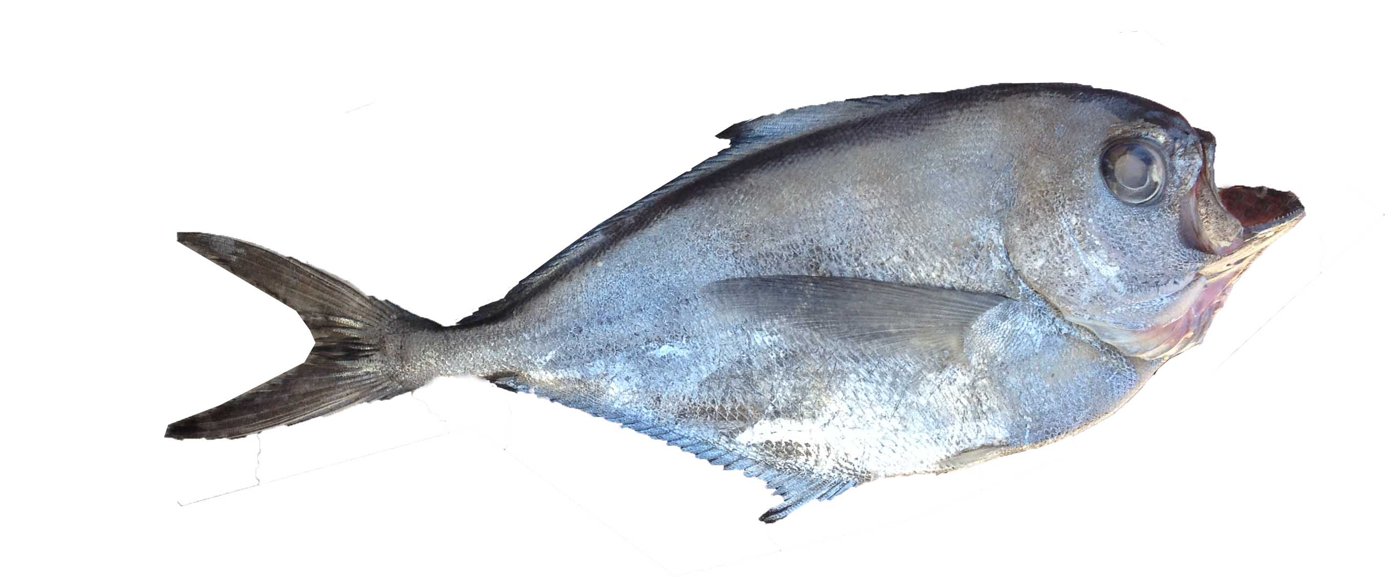 La reineta o pez hacha (Brama australis)